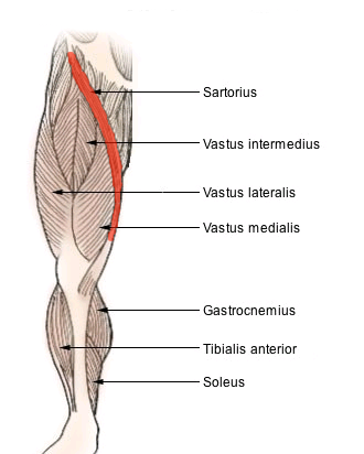 Sartorius muscle